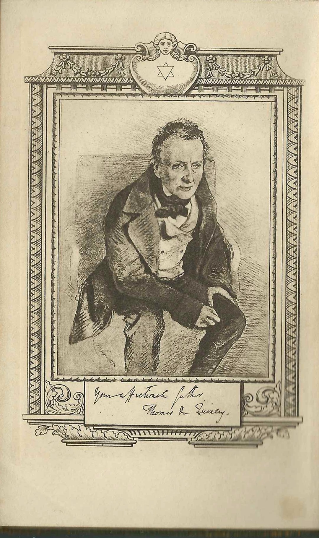 Frontiscipe de l'édition de 1899 par J-M Dent and co, Aldine- House-London, de 'The confessions of an English opium eater.